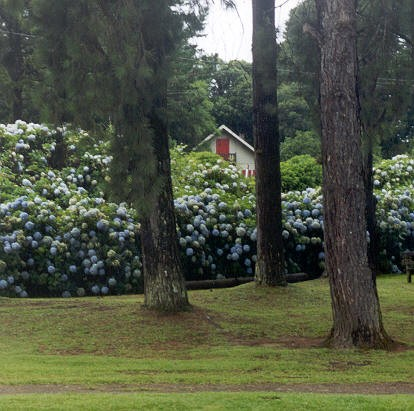 Casa en Gramado